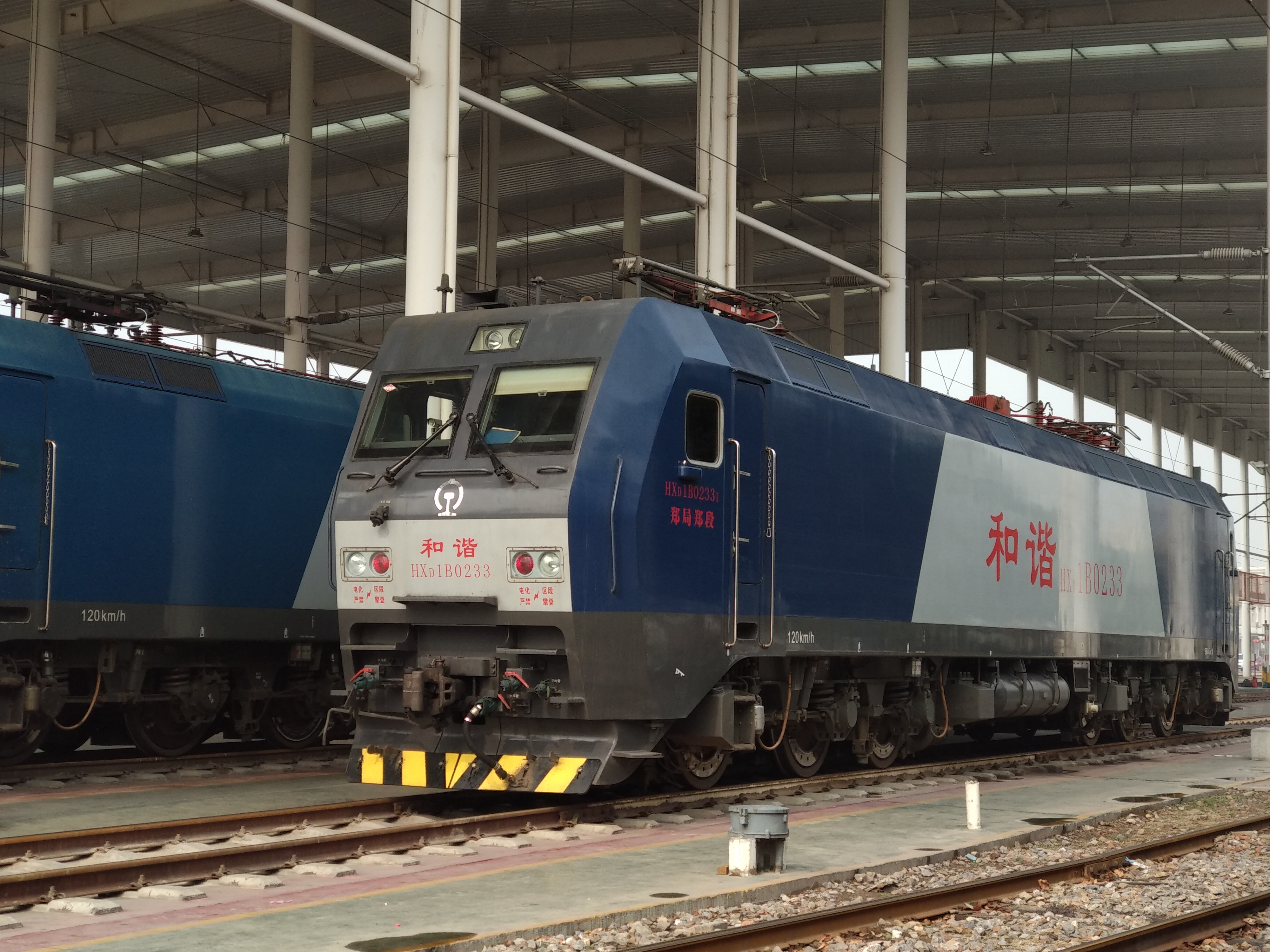 郑局郑段HXD1B型0233号电力机车在郑州北机务段整备场